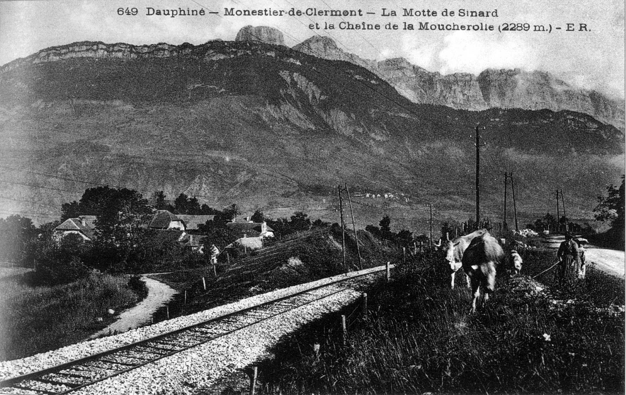 Monestier-de-Clermont, la Motte de Sinard et la Cheine de la Moucherotte (2289 m)